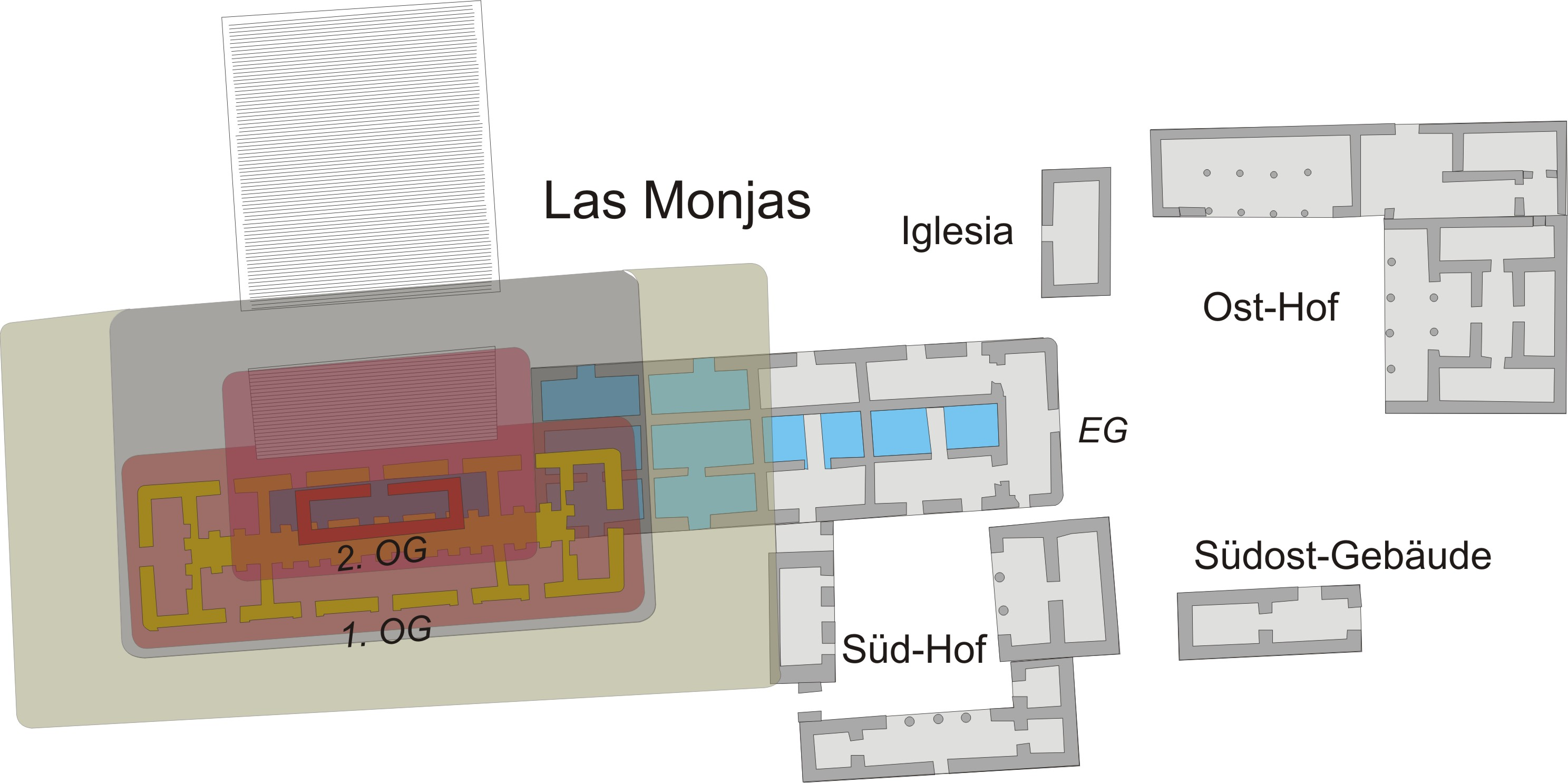 Chichen Itza, Yucatan, Mexiko. Las Monjas, Plan